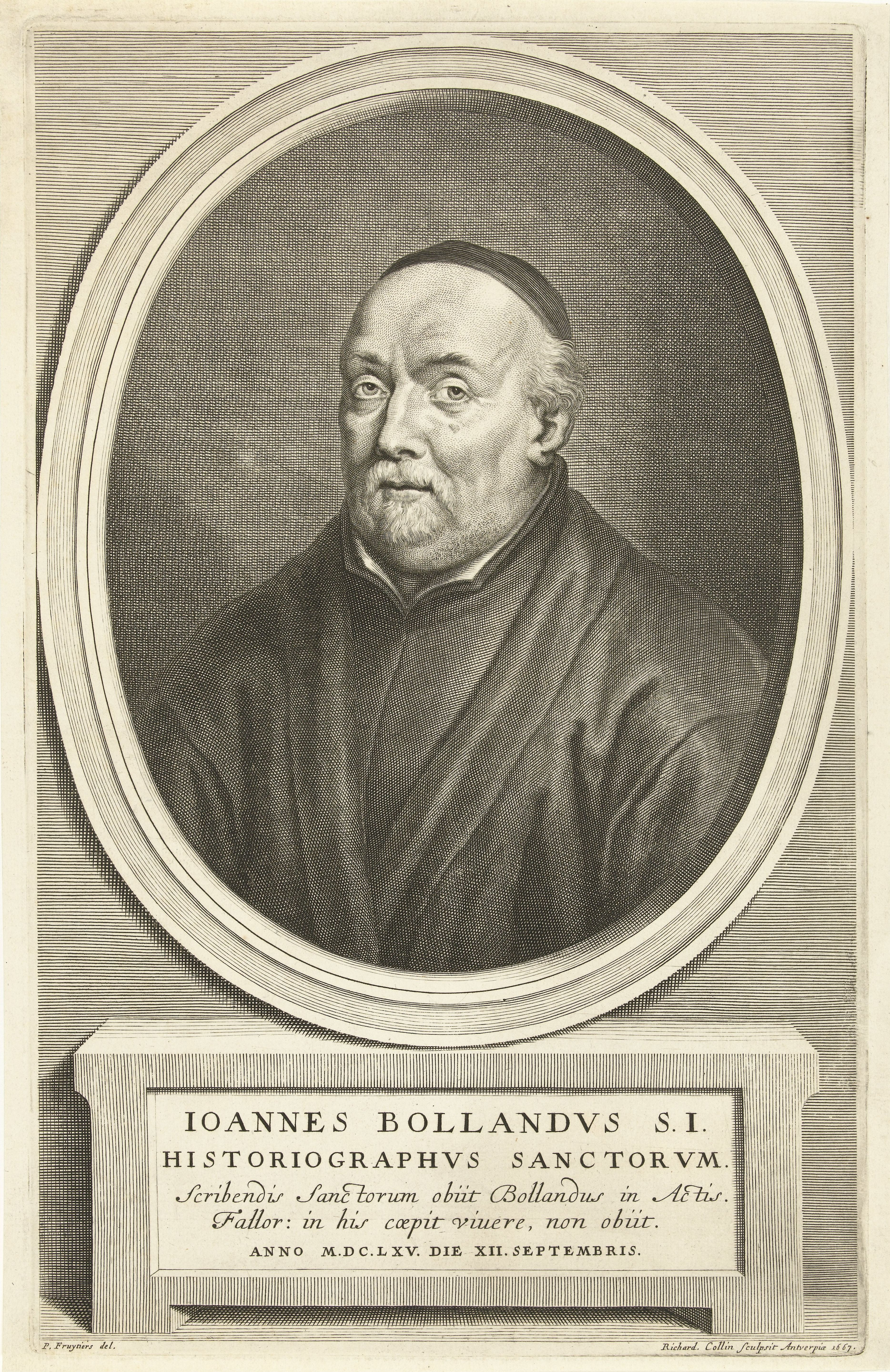 IdentificatieTitel(s): Portret van Johann BollandObjecttype: prent Objectnummer: RP-P-1906-649Opschriften / Merken: verzamelaarsmerk, verso, gestempeld: Lugt 2228Omschrijving: Borstbeeld van de jezuïet Johannes Bolland, in ovaal. Onder het portret zijn naam en levensdata.VervaardigingVervaardiger: prentmaker: Richard Collin (vermeld op object)naar tekening van: Philip Fruytiers (vermeld op object)Plaats vervaardiging: AntwerpenDatering: 1667Fysieke kenmerken: gravureMateriaal: papier Techniek: graveren (drukprocedé)Afmetingen: plaatrand: h 316 mm × b 200 mmOnderwerpWie: Johannes BollandVerwerving en rechtenVerwerving: aankoop 1906Copyright: Publiek domein